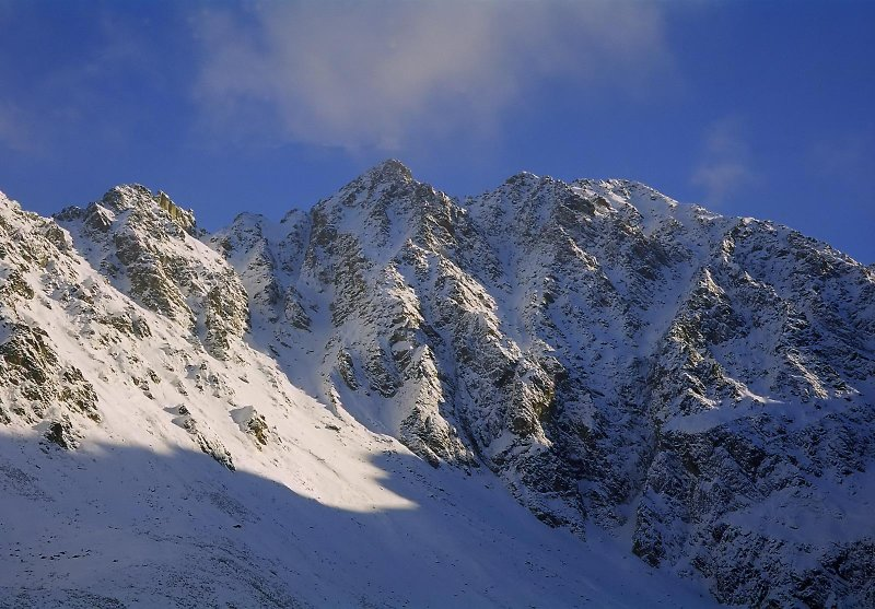 Północno zachodnia ściana Granatów widziana z Czarnego Stawu. Od lewej: Żółta Przełęcz jeszcze oświetlony Wierch pod Fajki już w cieniu Pańszczycka Przełęcz Skrajna Pańszczycka Czuba Pańszczycka Przełączka Pośrednia Zadnia Pańszczycka Czuba Pańszczycka Przełączka Wyżnia Granaty najwyższy Skrajny Granat wybitne siodło Skrajnej Sieczkowej Przełączki - z niej opada, początkowo szeroki i rozłożysty Żleb Drege'a, którego dolne partie, juz po przekształceniu się w komin znikają w cieniu, zasłonięte skałami kulminacji prawego żebra Granata. Pośredni Granat niewidoczna Pośrednia Sieczkowa Przełączka zupełnie płaski i niepozorny grzbiet Zadniego Granata